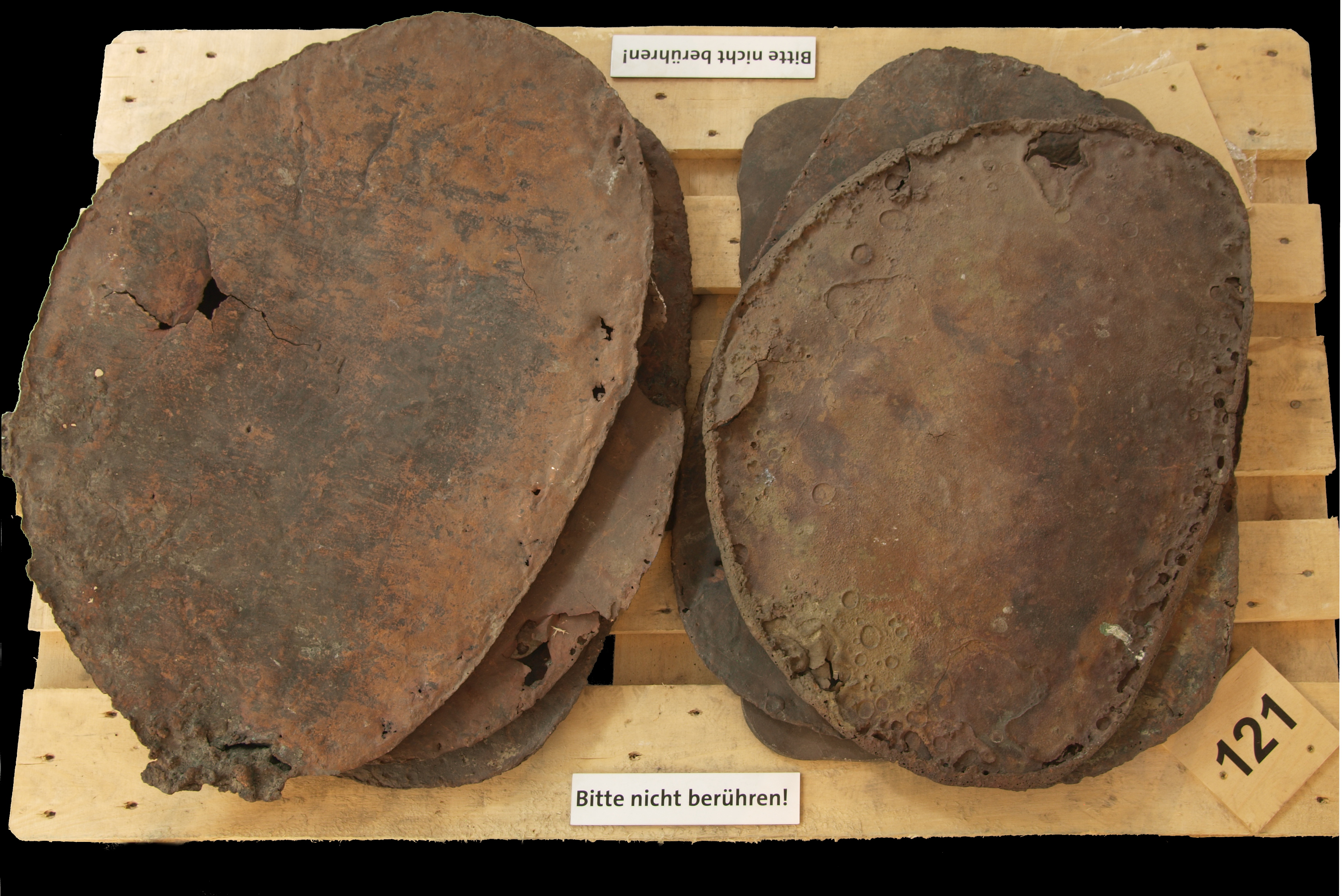 Sechs Reißkupferscheiben / Garkupferscheiben der Kupferbarren von Wittenbergen aus einem Seigerungsprozess auf einer Europalette. Gefunden 1981 aus einem im 17. Jahrhundert gesunkenem Segelschiff aus der Elbe bei Wittenbergen in Hamburg-Rissen, Deutschland. Fotografiert im Archäologischen Museum Hamburg, Deutschland.